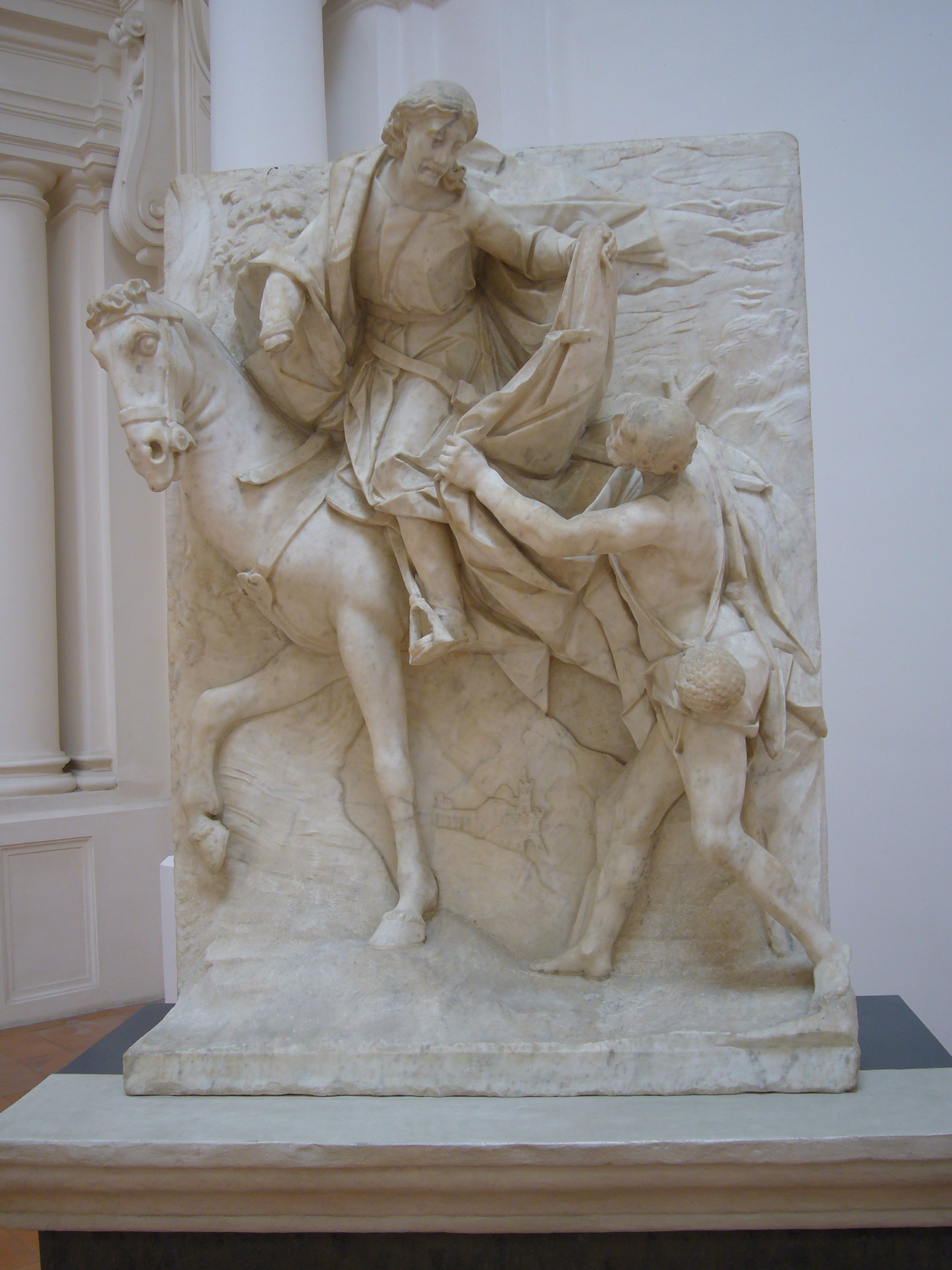 Napoli, Certosa di san Martino: Pietro Bernini: San Martino divide il mantello con il povero (dal portale d'ingresso alla Certosa).